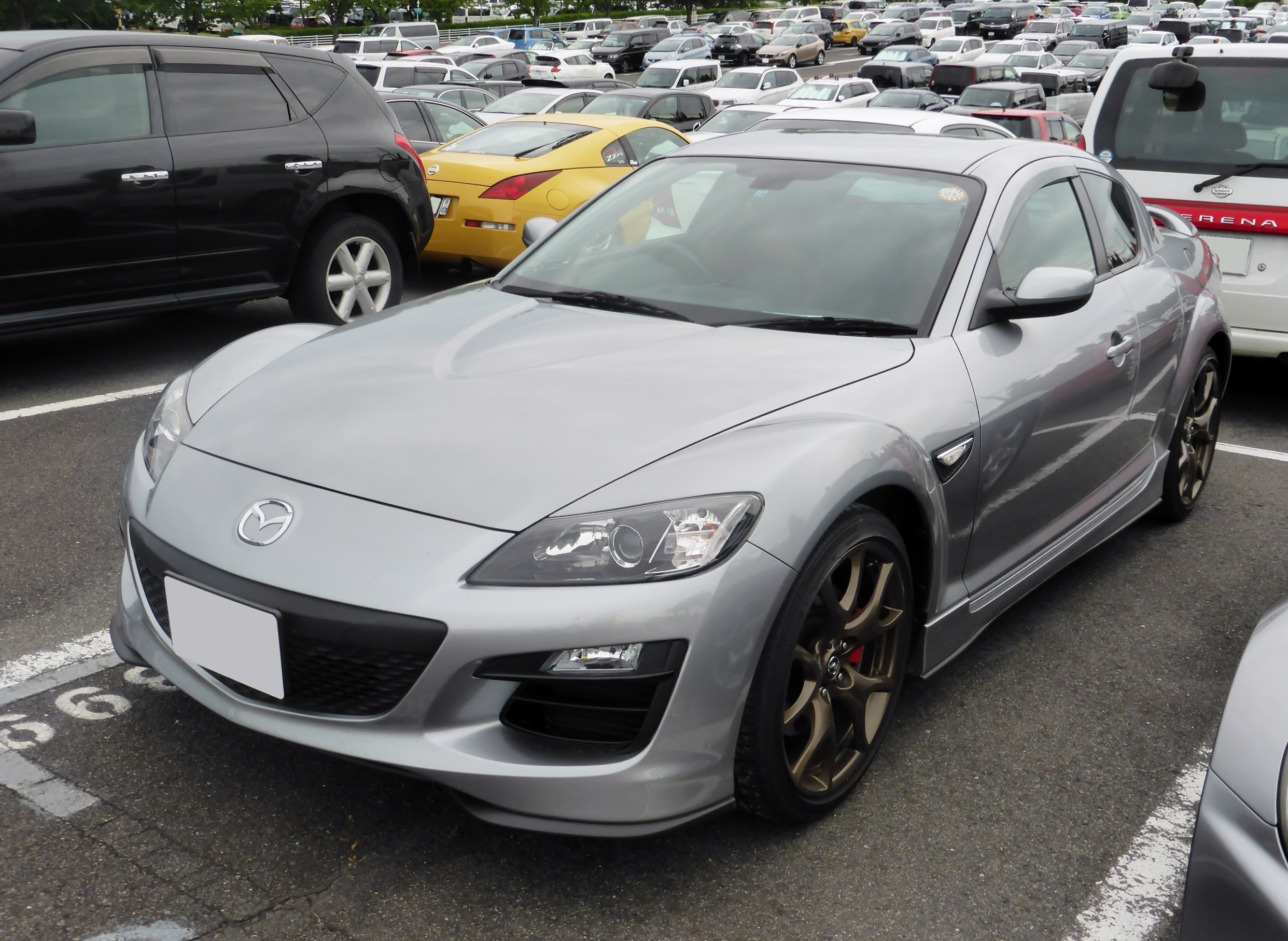 SE3P型マツダ・RX-8スピリットRをフロントから撮影。